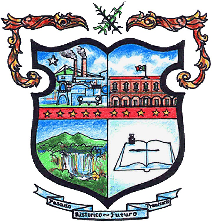 Representa lo más característico de este municipio.